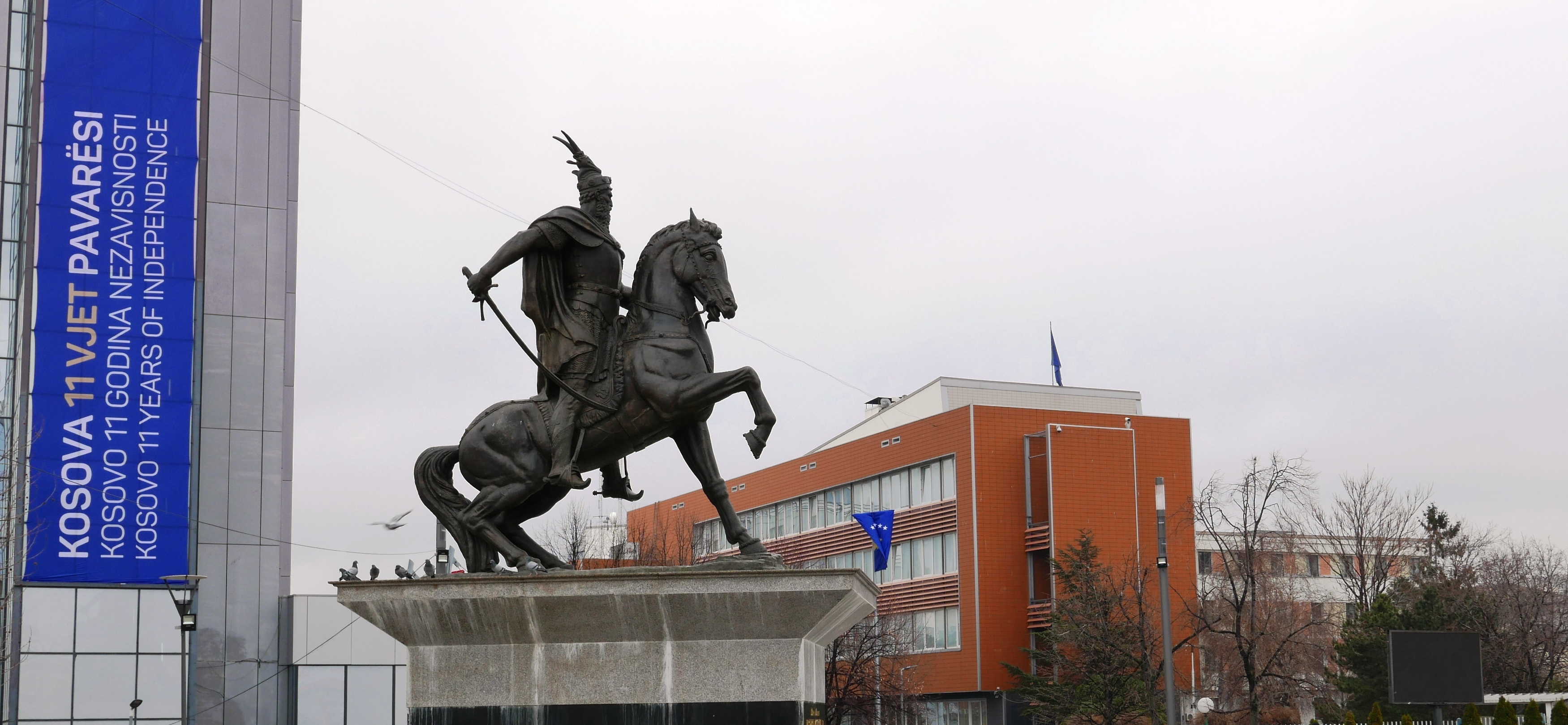 Permendorje e Skenderbeut në Prishtinë